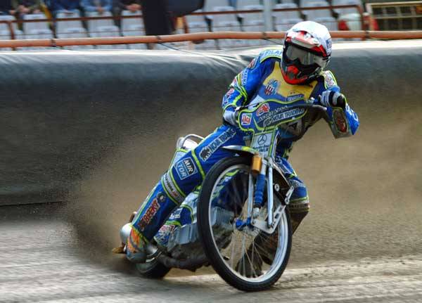 Karol Ząbik; Apator Toruń; 2006